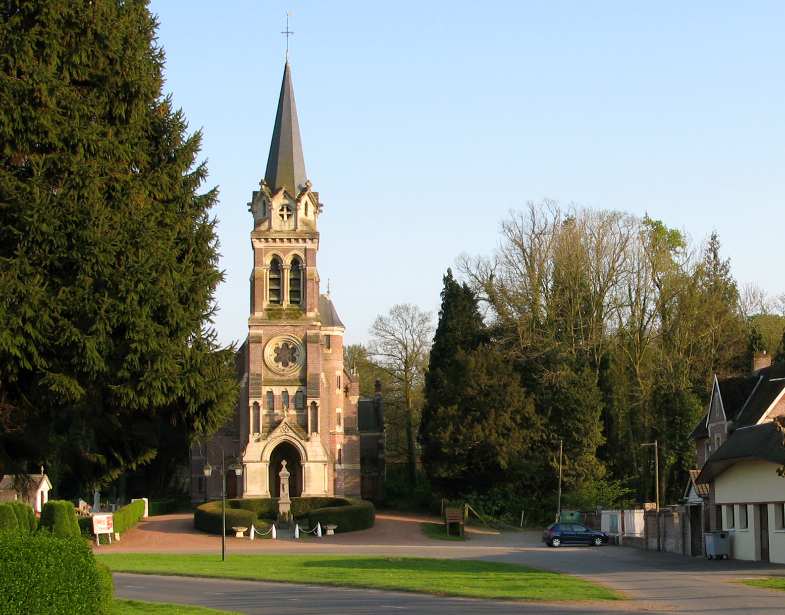 Bryas (Pas-de-Calais, France) - L'église, avec le monument-aux-morts dressé juste en face de son portail. .